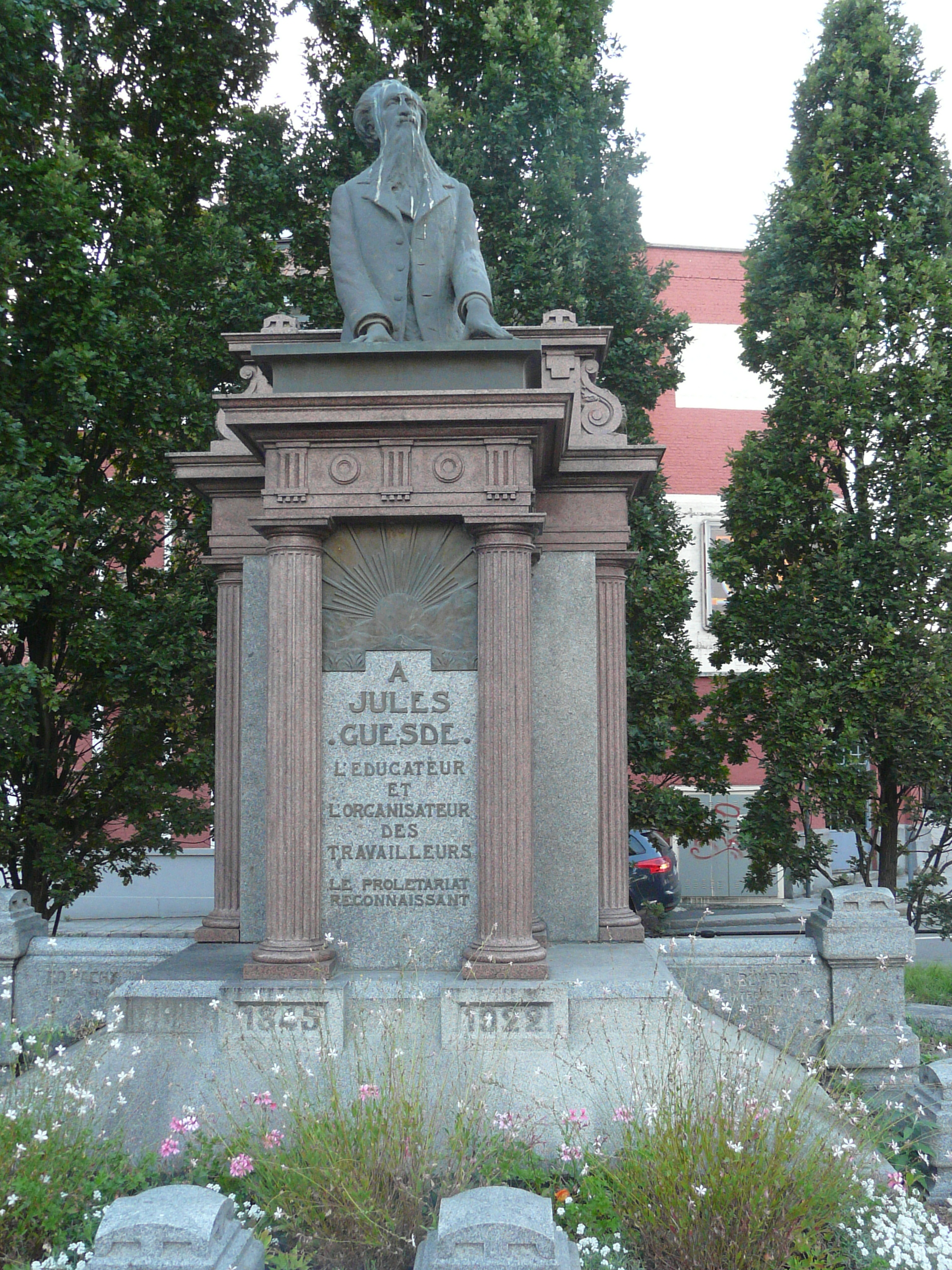 Monument à Jules Guesde, avenue Jean-Baptiste Lebas à Roubaix.